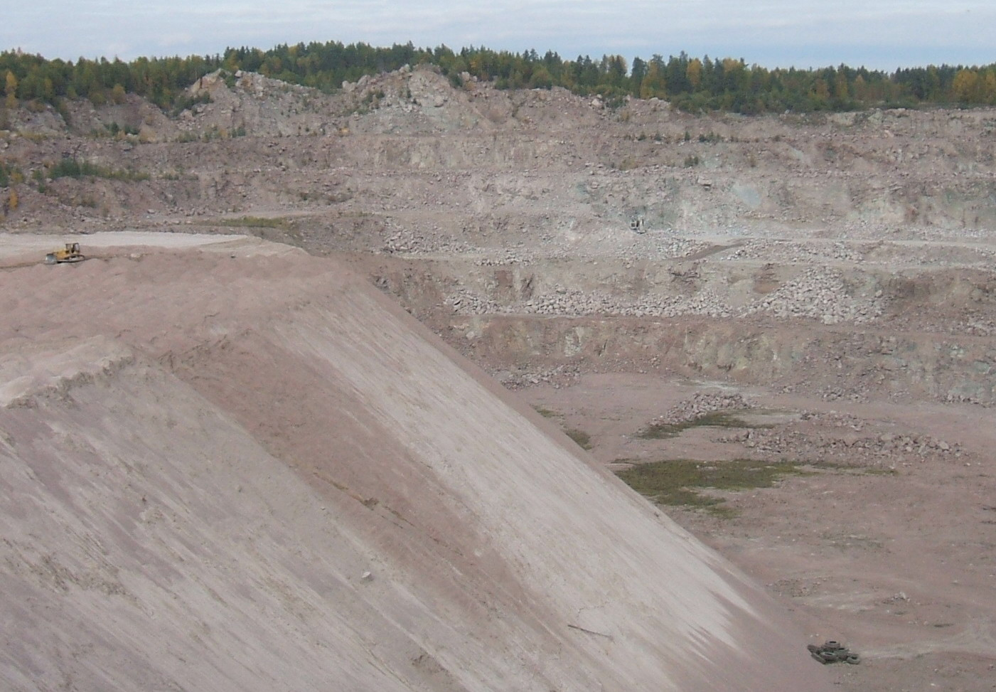 Виды п.Кузнечное Лен.обл.